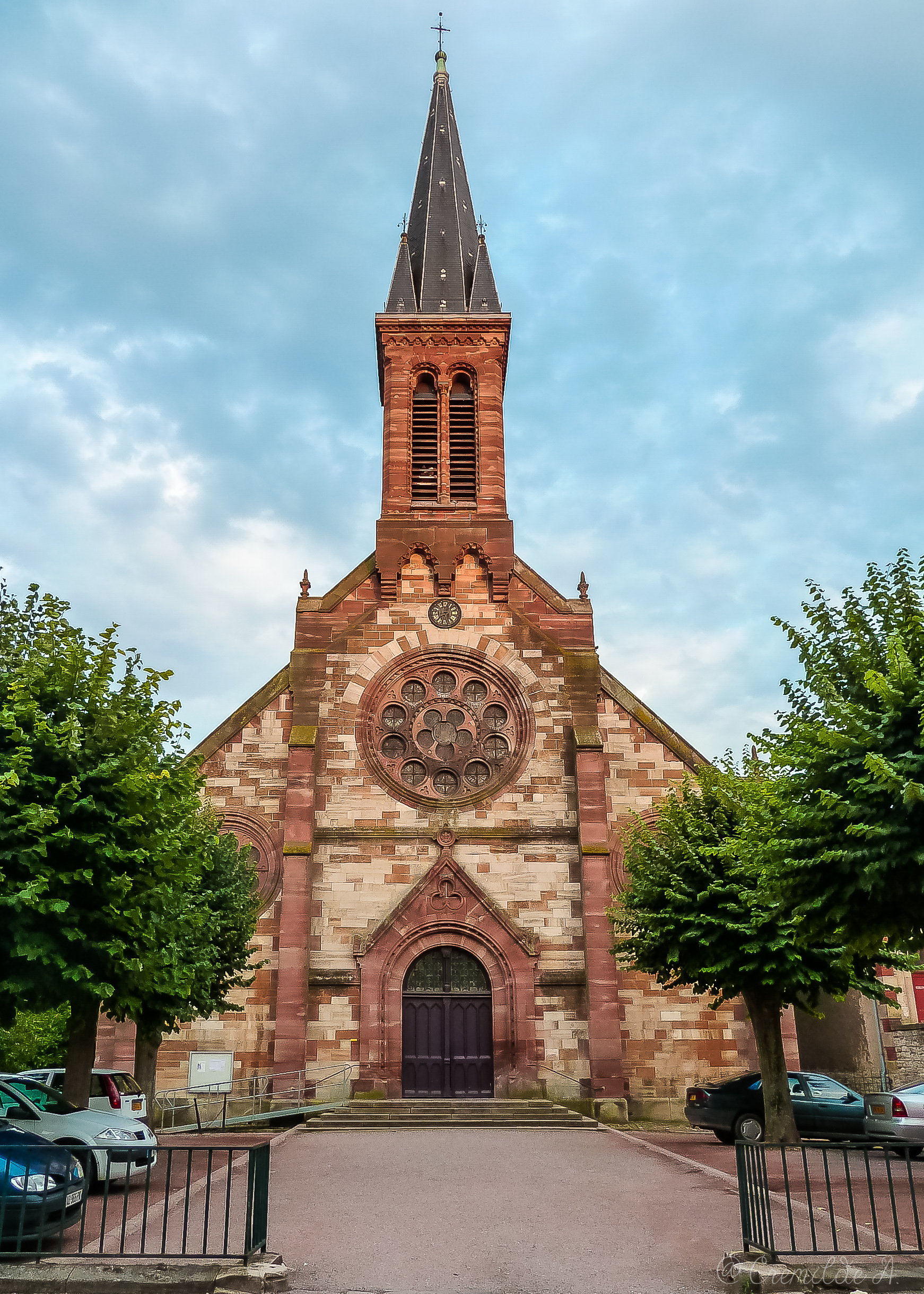 Église Saint-Maur, rue de Viller à Lunéville